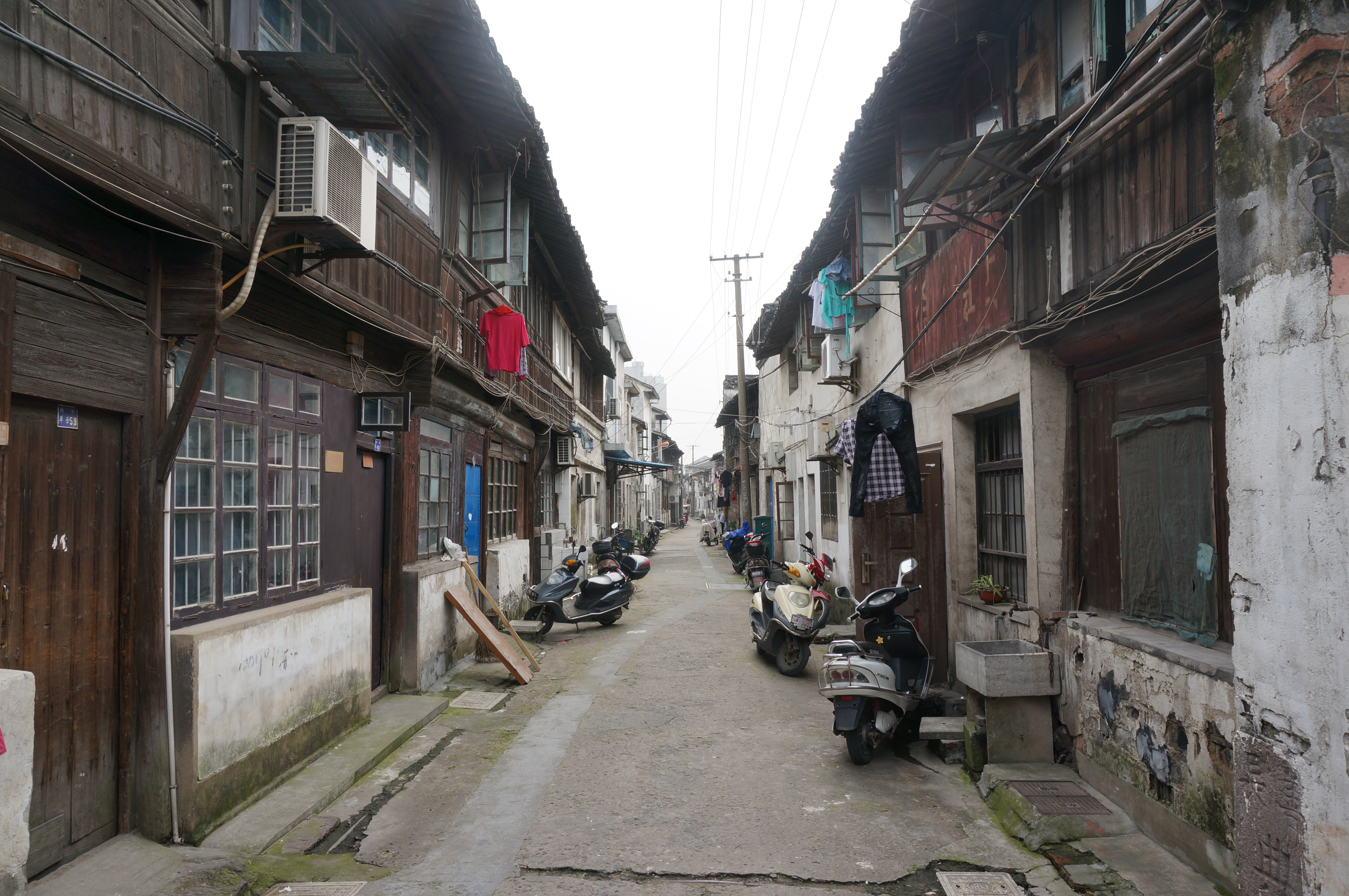 桐乡市崇福镇横街，自与学前弄交叉口处向西看。